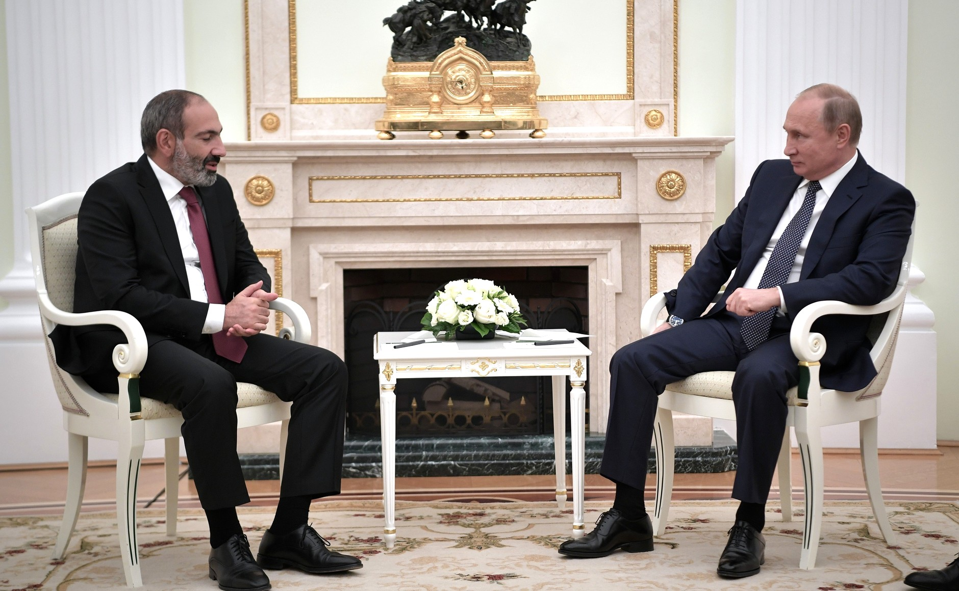 Встреча Президента России Владимира Путина с Премьер-министром Республики Армения Николом Пашиняном